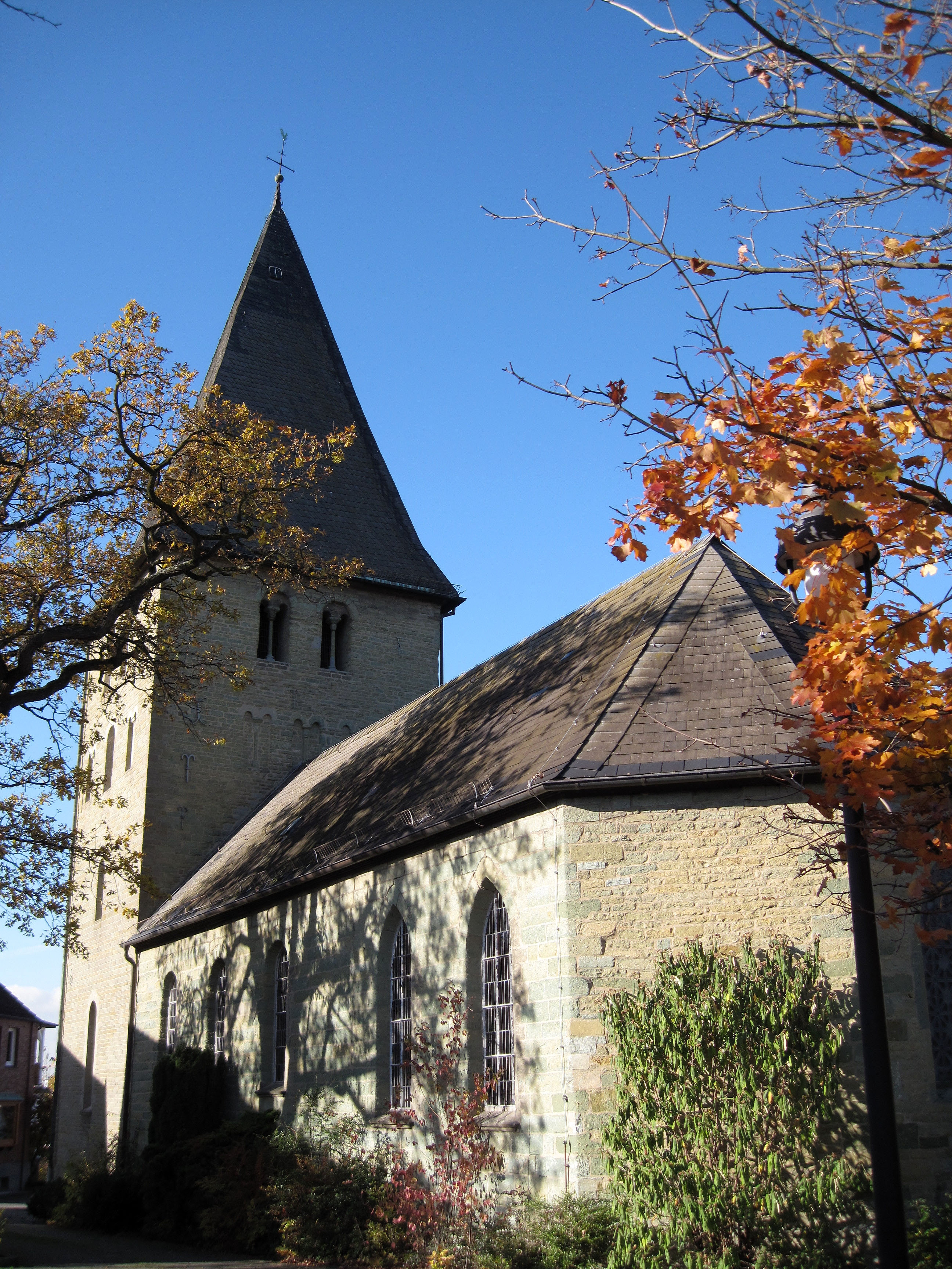 Werl, Hilbeck, Evangelische Kirche, Rückansicht in Richtung Turm